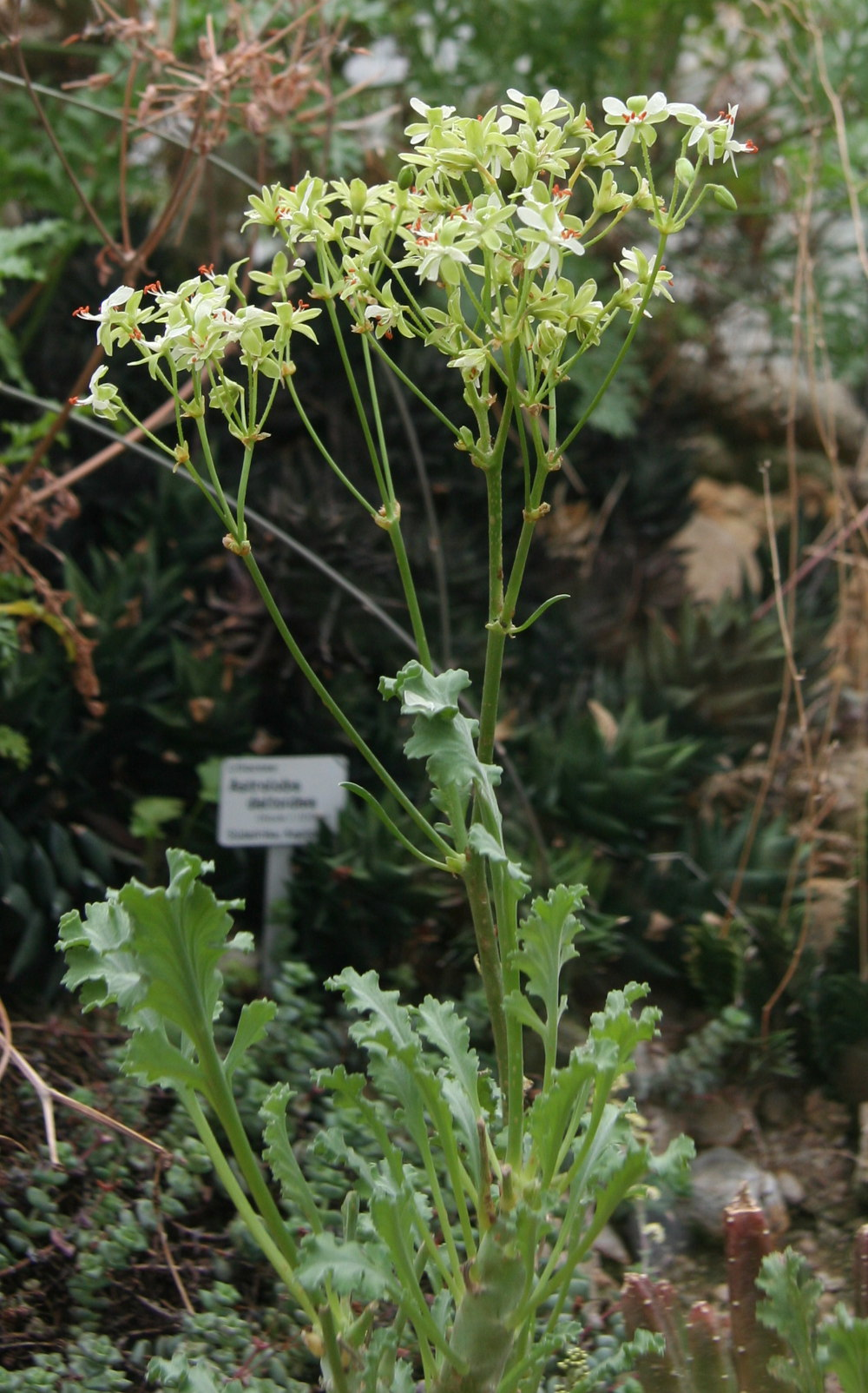 Pelargonium klinghardtense im Botanischen Garten Dresden